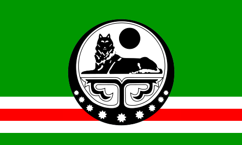 Flag